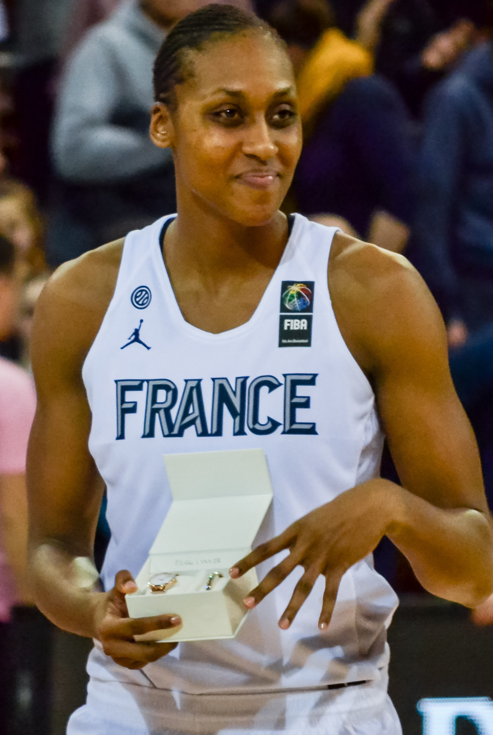 Rencontre de l'Equipe de France féminine de basket-ball contre la Finlande (90-40), comptant pour les qualifications à l'Euro 2019, le 14 février 2018 à Brest. C'était la première fois que la Brest Arena, d'une capacité de 5 000 spectateurs, accueillait un match international de basket.